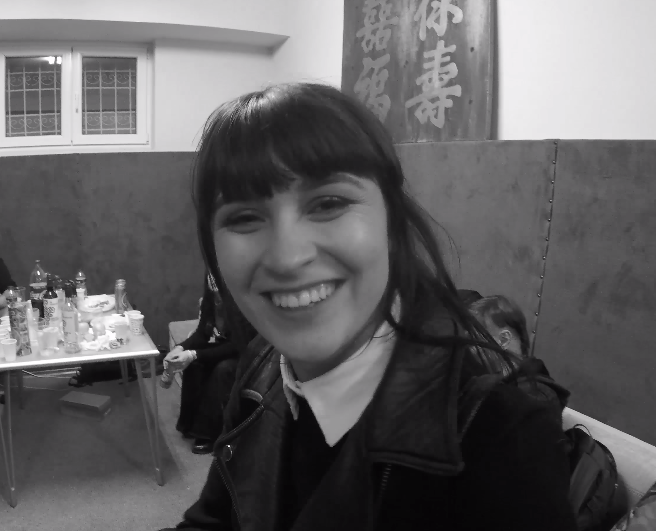 Irinei Rimes într-un vlog al formației GUZ.